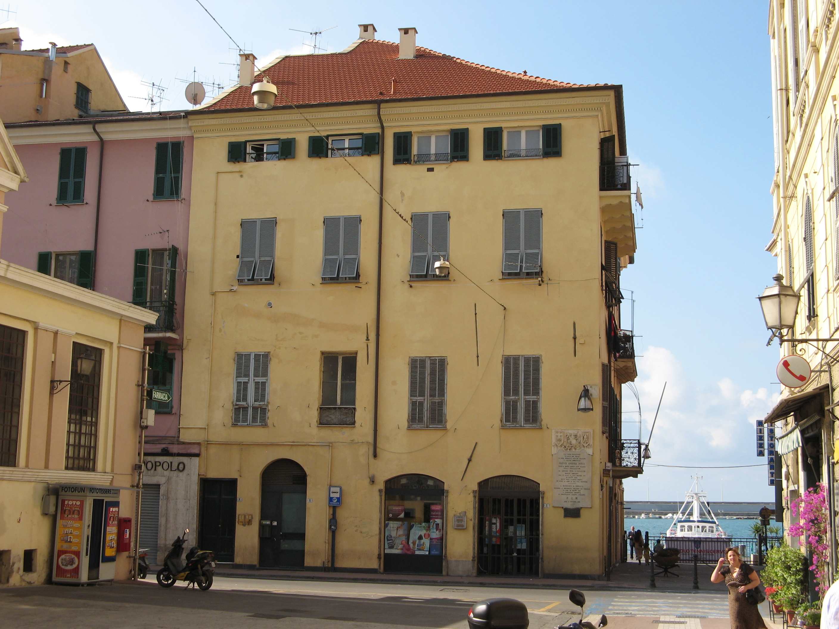 Casa Natale di Andrea Doria, Oneglia, Imperia, Italy